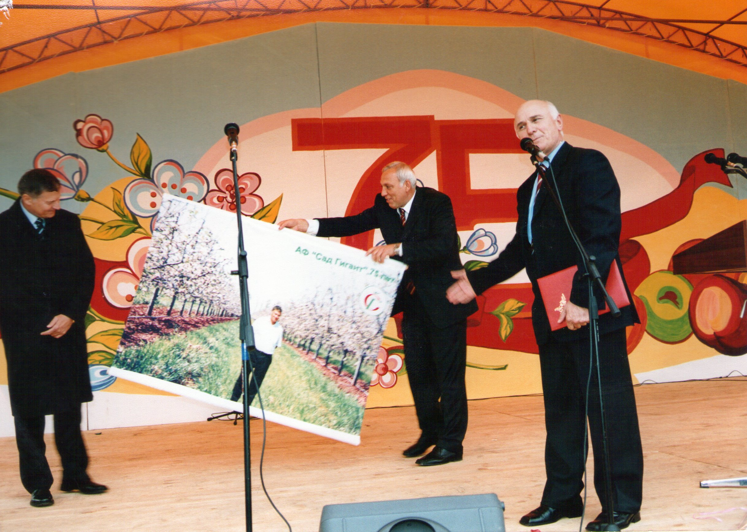 На юбилее ЗАО "Сад-Гигант"